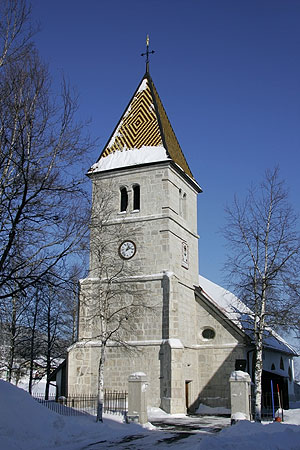 Kirche von La Brévine